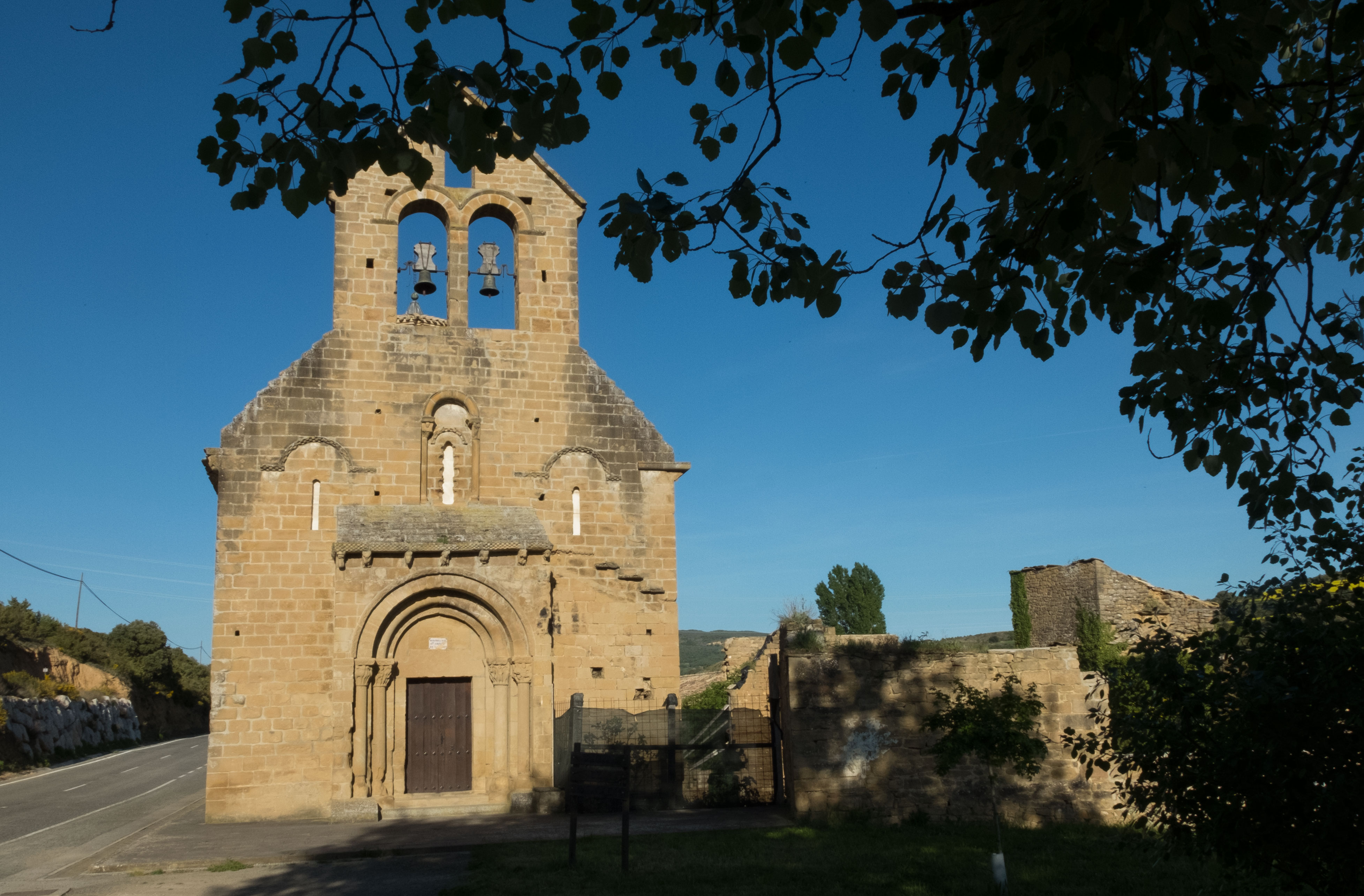 Montes de la Valdorba - Ermita del Santo Cristo de Catalain